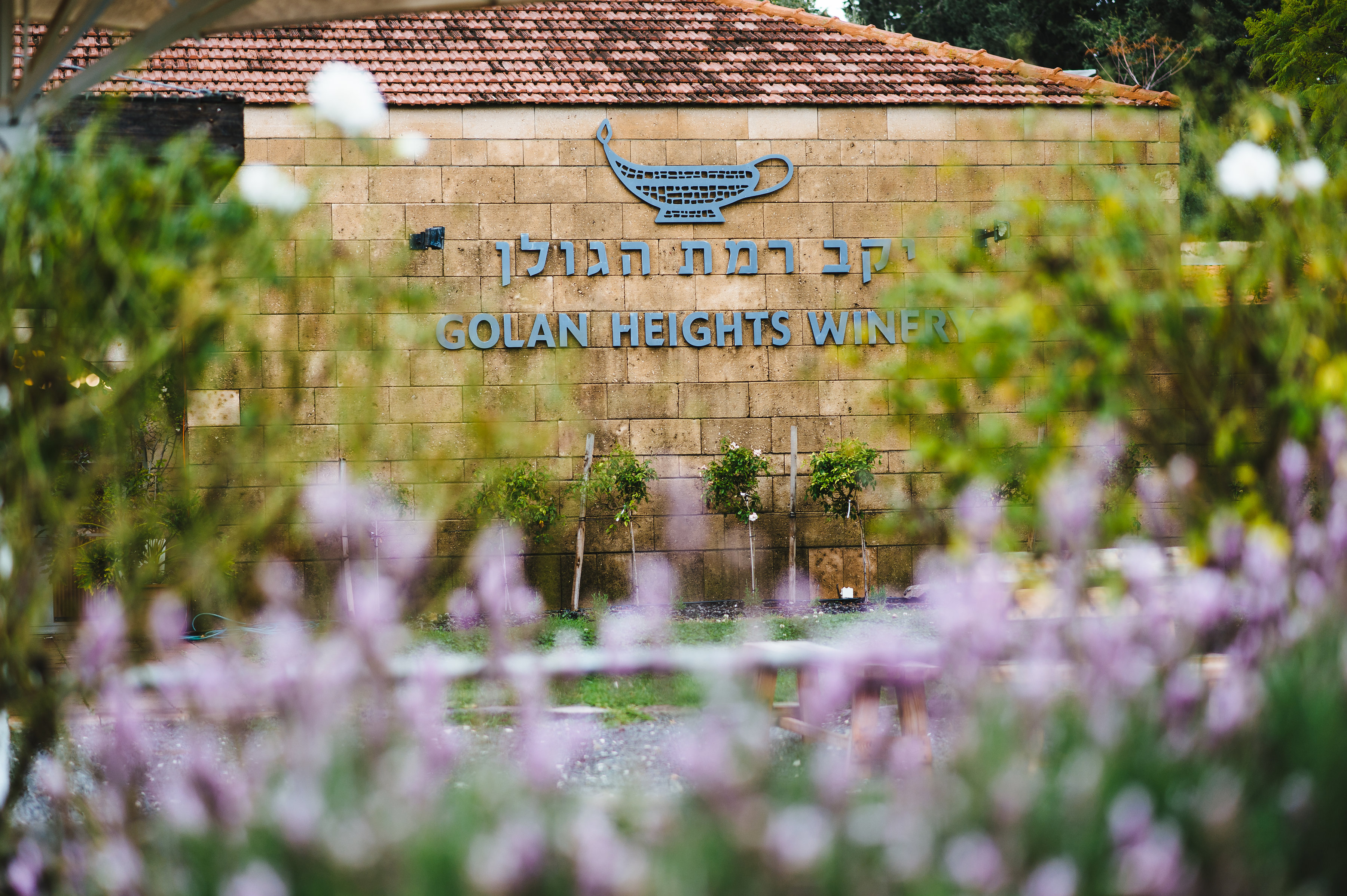 מרכז המבקרים של יקב רמת הגולן